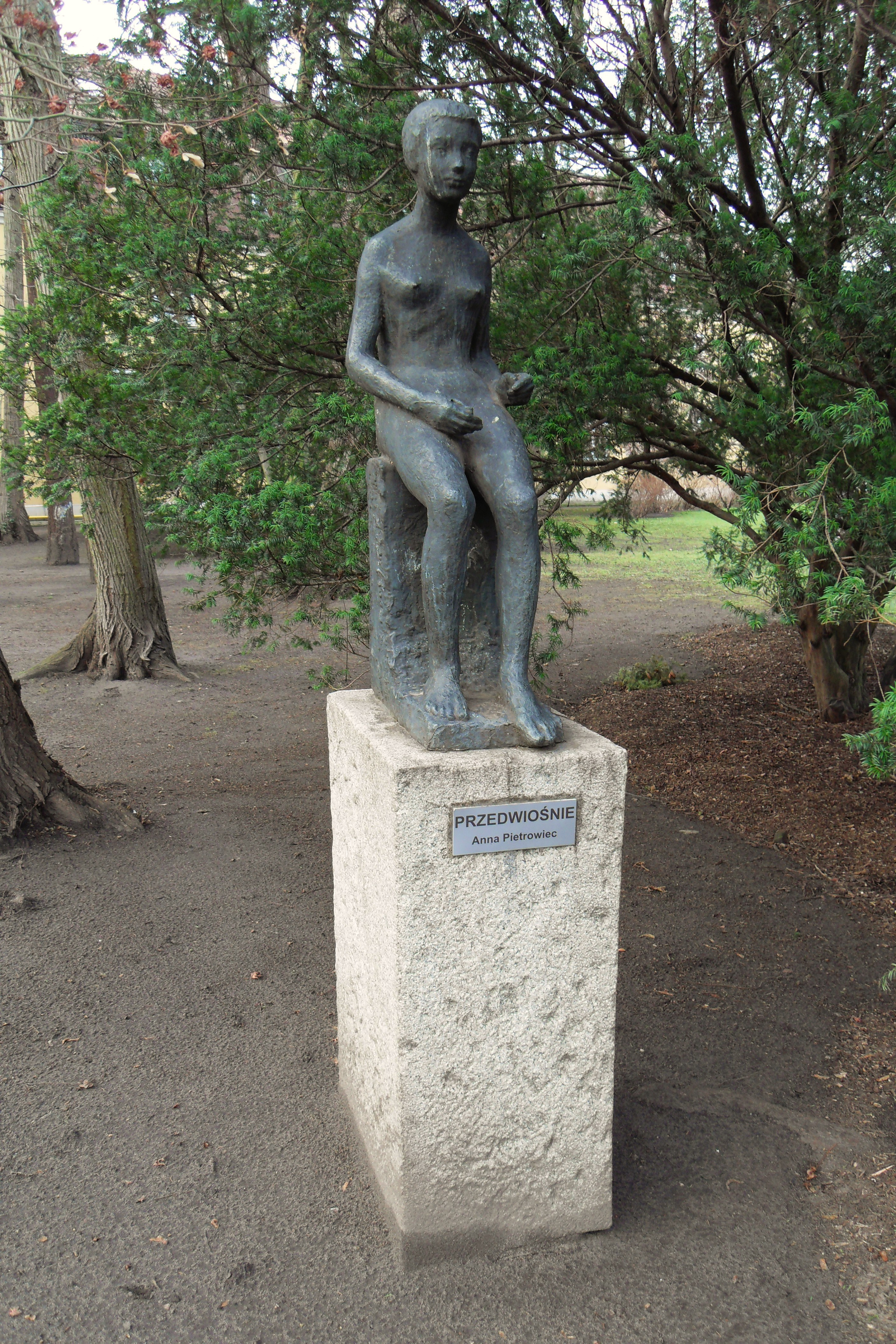 Park Oliwski, rzeźba "Przedwiośnie", autor Anna Pietrowiec.